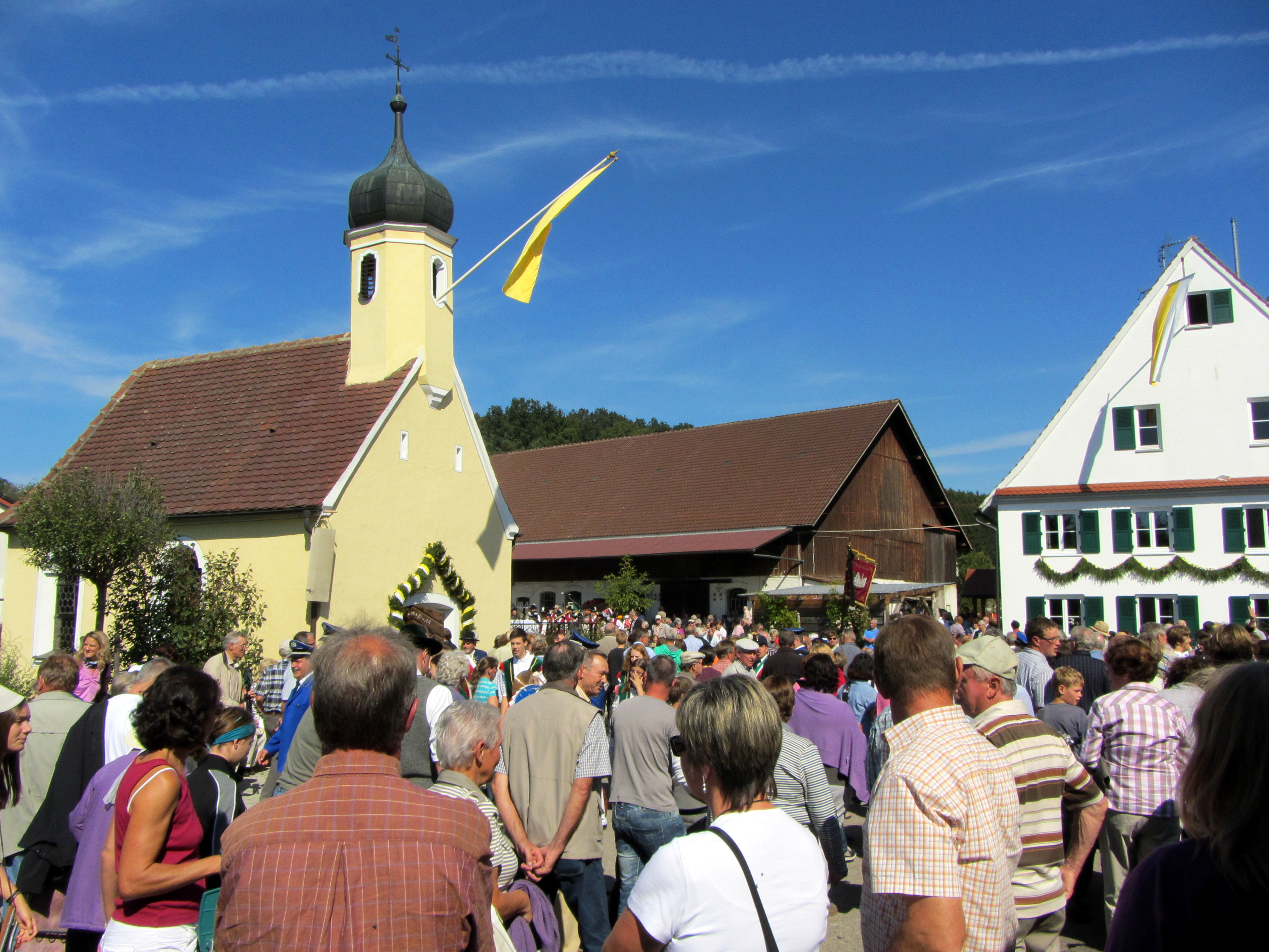 Wendelinusritt (Niedernzell)